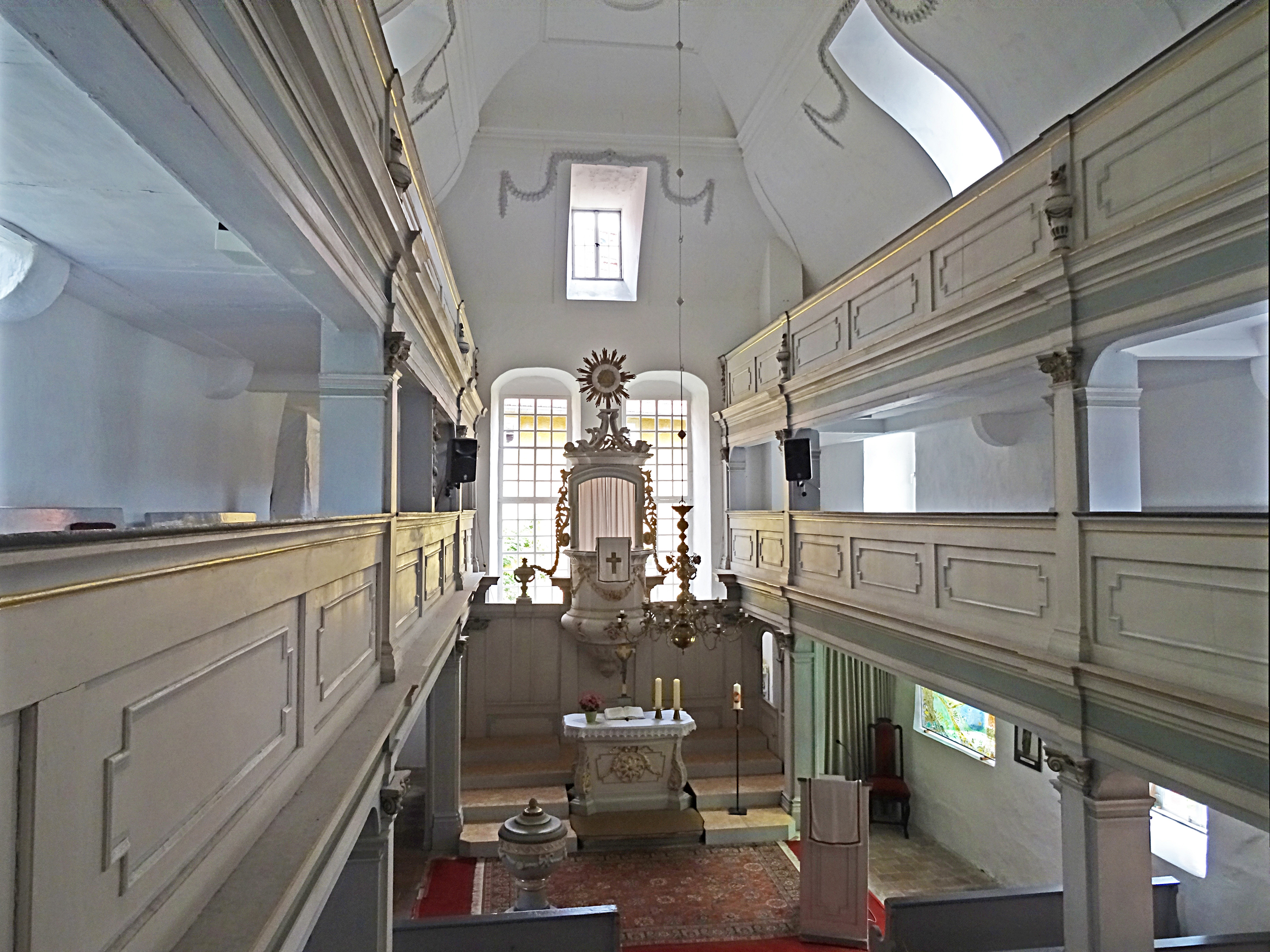 Blick zum Kanzelaltar in der Dorfkirche Angelroda